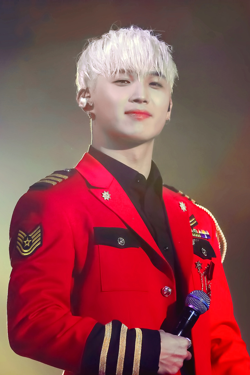 170121-22 비티비티 현식